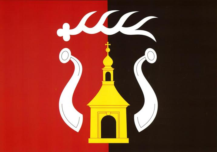 Nezbavětice vlajka